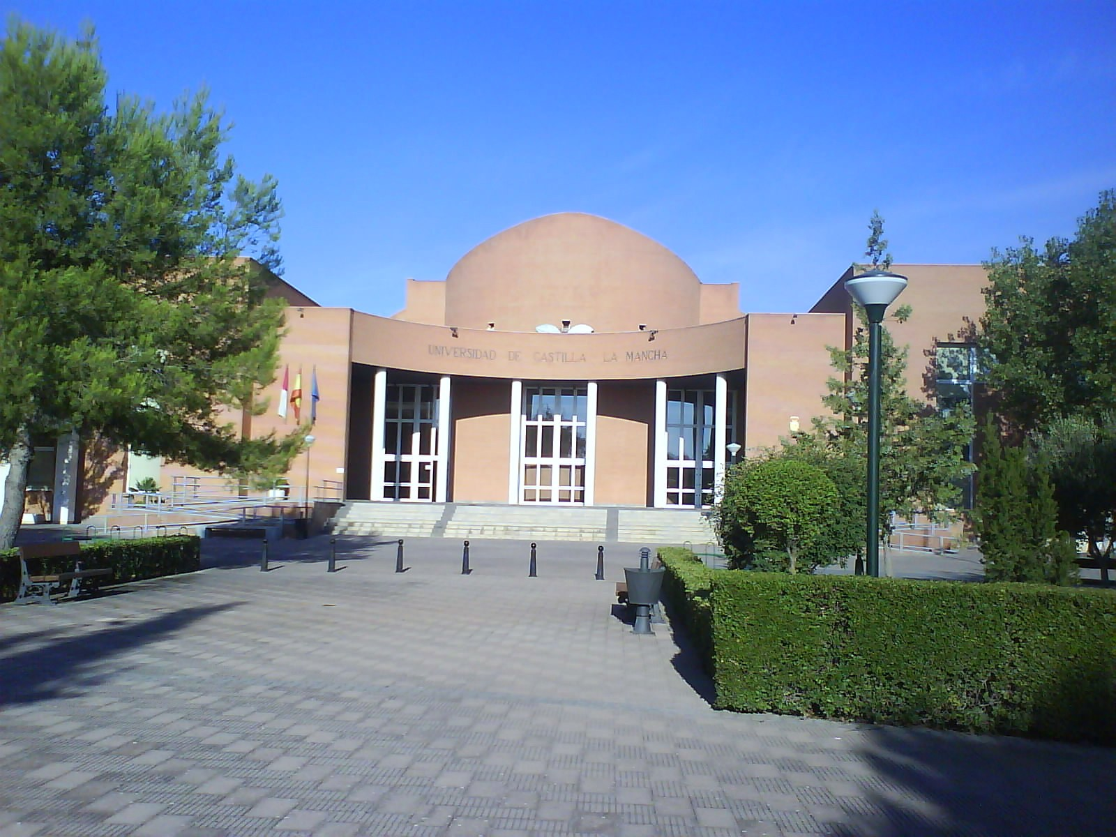 Sede del Vicerrectorado del Campus Universitario de Albacete